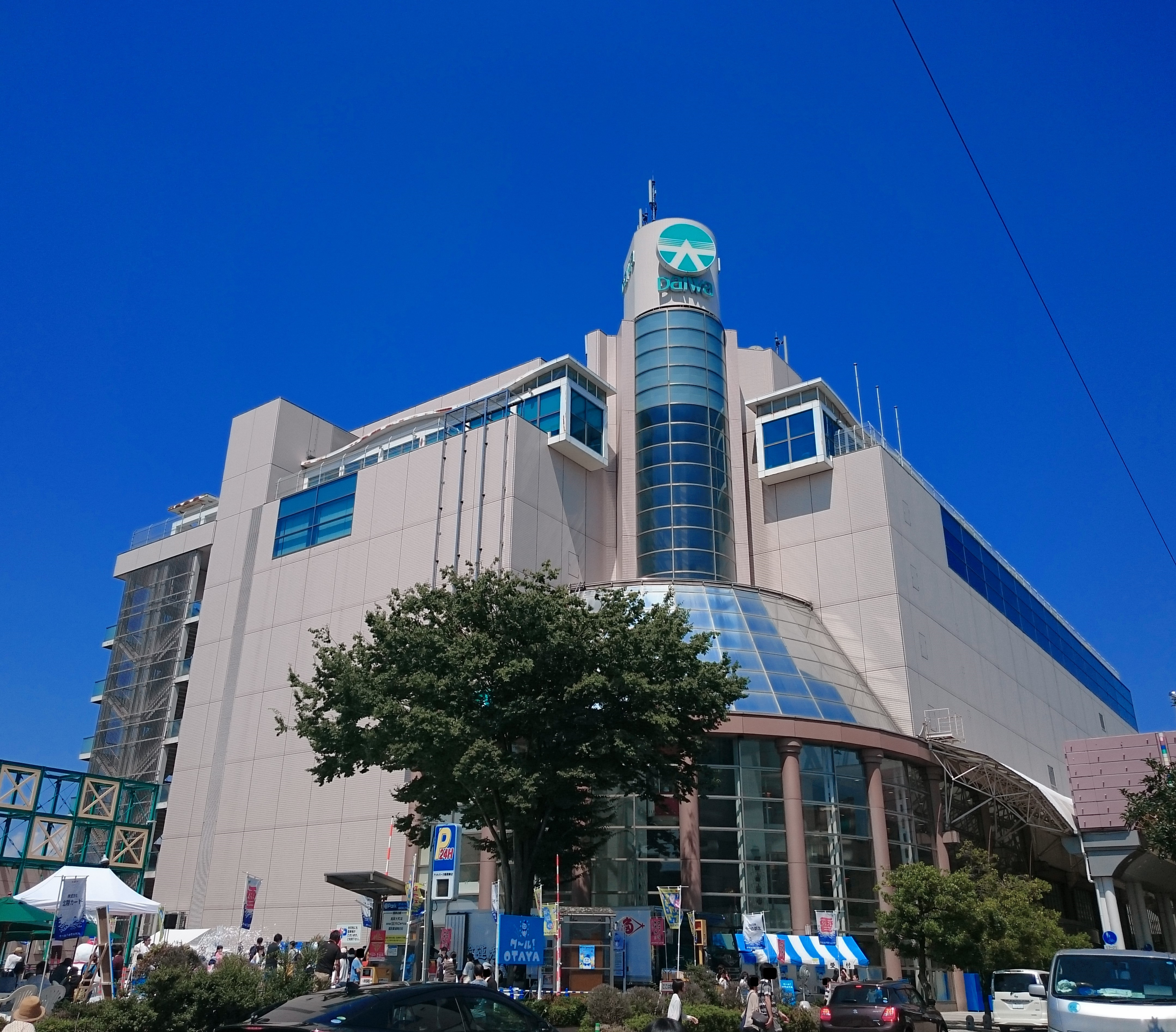 高岡大和の外観 Sony Xperia Z3